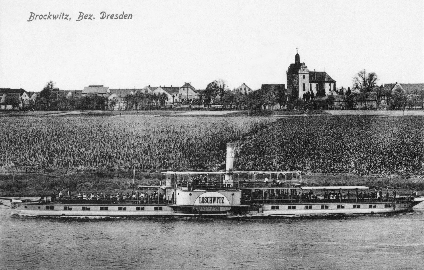 Brockwitz; Blick auf Brockwitz - Elbe mit Dampfer Loschwitz This postcard is from publisher Brück & Sohn in Meißen ( postcard has a unique number 20916 and is available in a higher resolution at the publisher. This images was uploaded in a cooperation project between Wikipedians and the publisher.